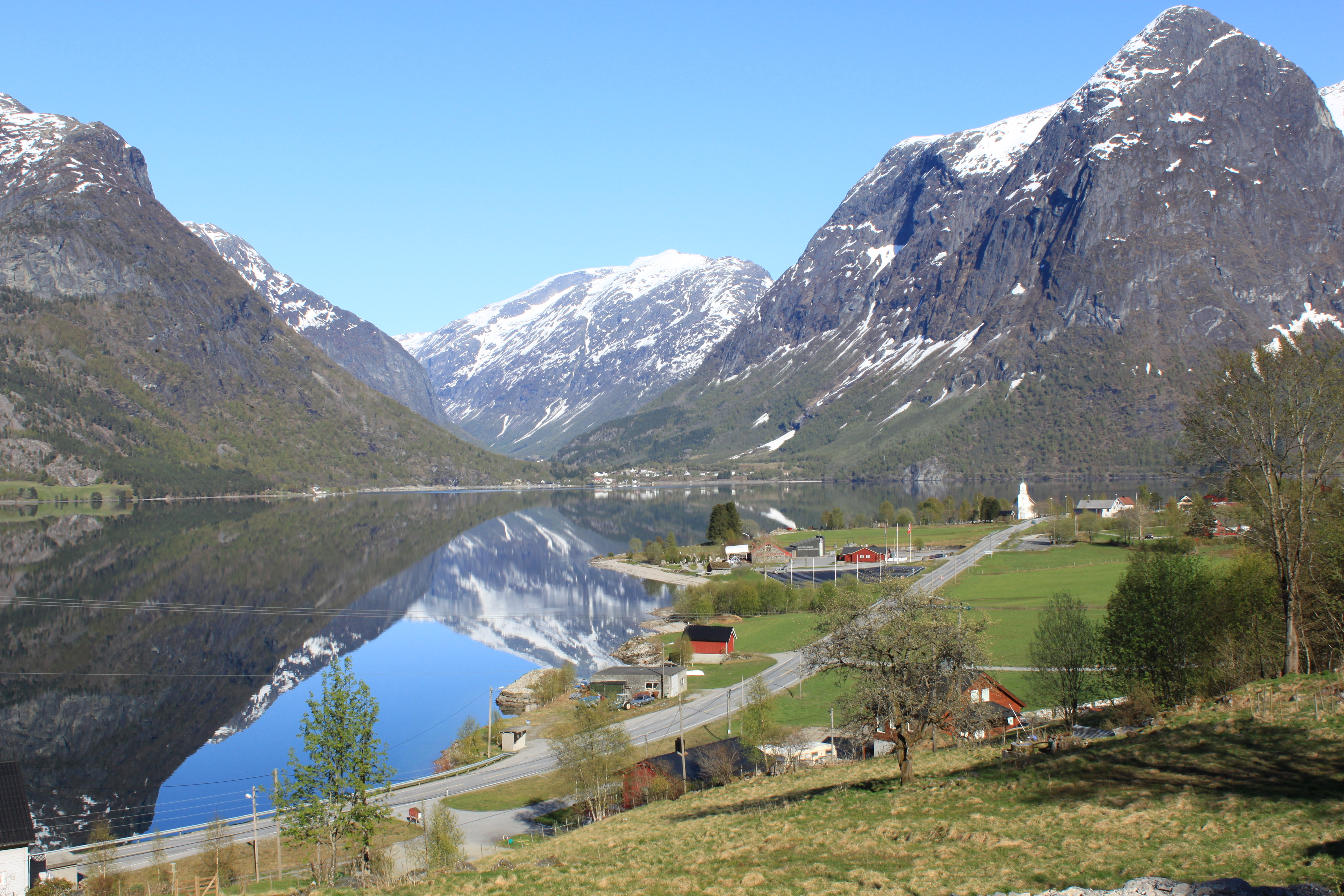 Utsikt over Oppstrynsvatnet, mot Hjelle.